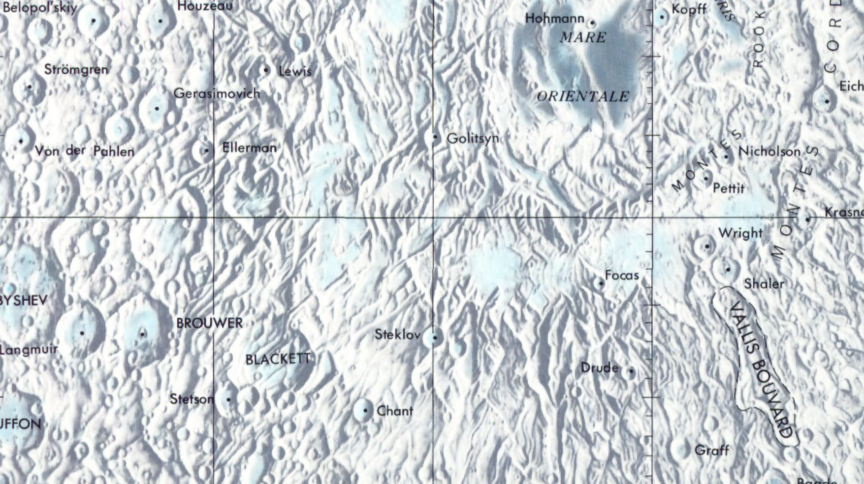 Cráter lunar Steklov. Localización. (Lunar Chart LPC1. Second Edition)